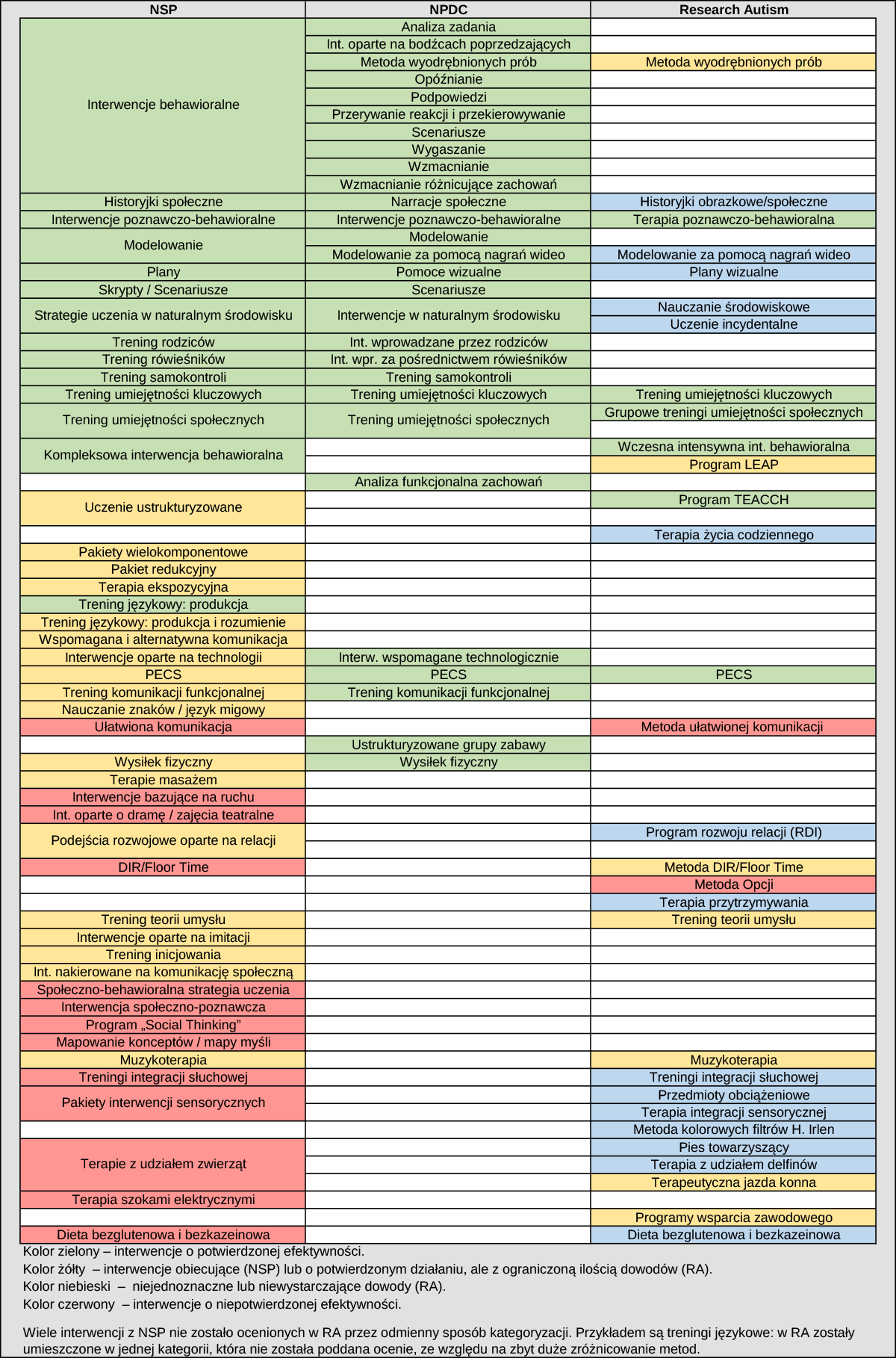 Zestawienie ocen efektywności interwencji stosowanych w terapii zaburzeń ze spektrum autyzmu. Oceny pochodzą z National Standards Project (NSP), National Professional Development Center on Autism Spectrum Disorder (NPDC) oraz z Research Autism (RA). Uwaga: Poszczególne grupy eksperckie przyjęły różne kryteria dla oceny efektywności interwencji terapeutycznych. Wiele interwencji z NSP nie zostało ocenionych w RA przez odmienny sposób kategoryzacji. Przykładem są treningi językowe: w RA zostały umieszczone w jednej kategorii, która nie została poddana ocenie, ze względu na zbyt duże zróżnicowanie metod.